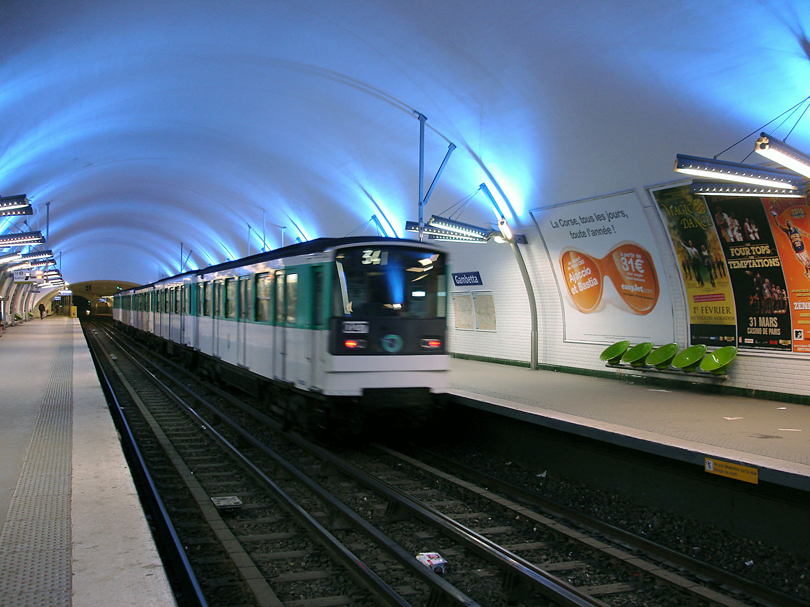 La station Gambetta de la ligne 3 du métro de Paris, France.